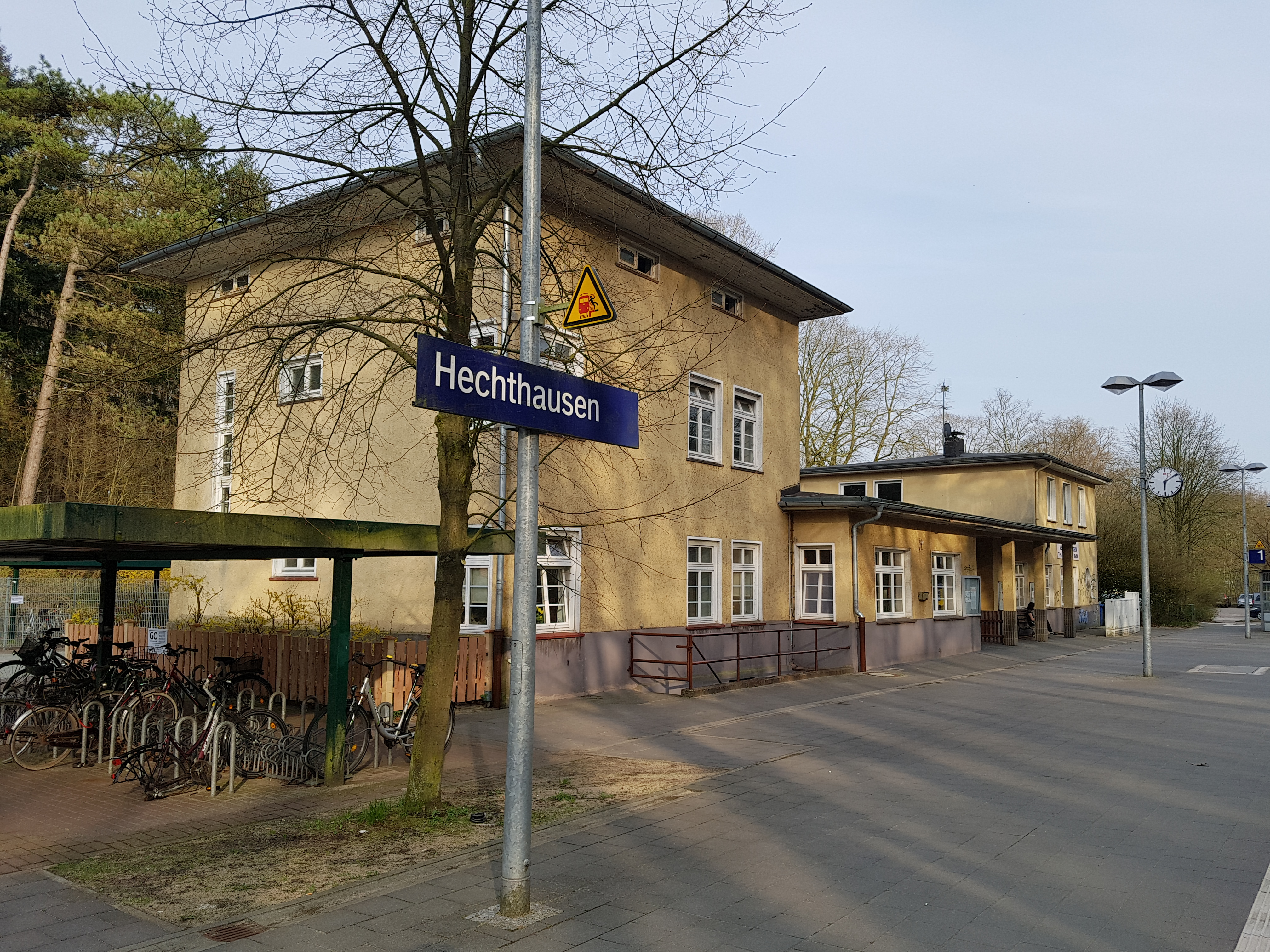 Bahnhoff in Heckthusen